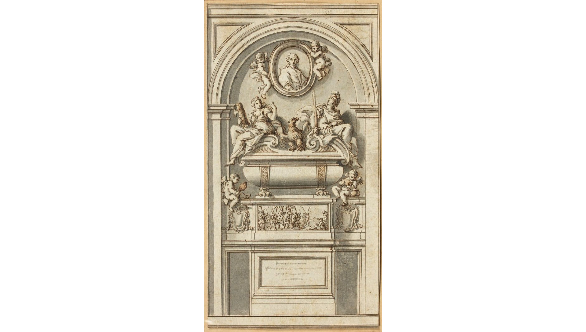 Projet, sans doute de Paolo Posi, pour le tombeau du cardinal Imperiali. 27,5 x 14,5 cm. 1737. Coll. part.